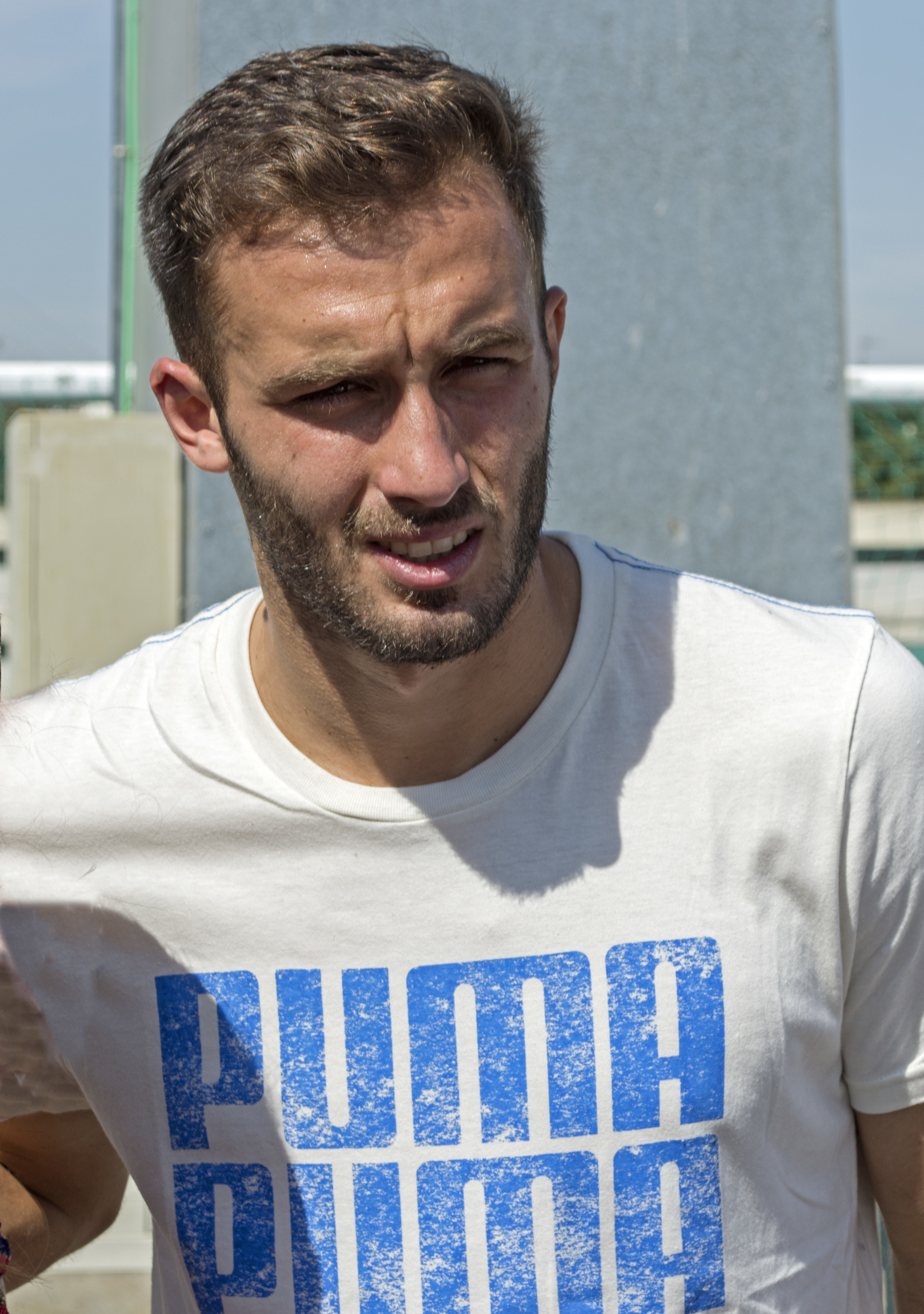 Germán Pezella, futbolista del Real Betis en 2015. Ciudad deportiva Luis del Sol